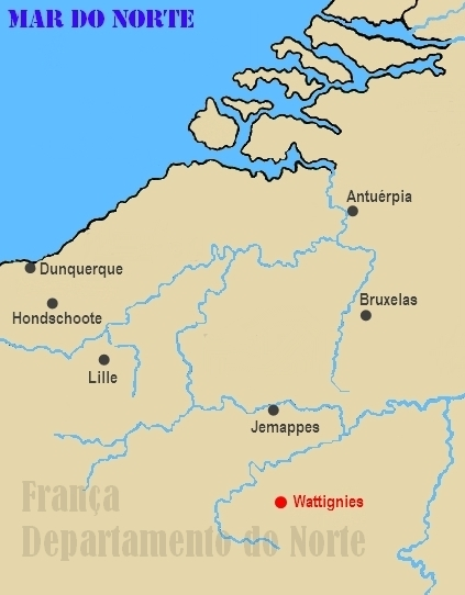 Mapa com a localização de Wattignies-la-Victoire